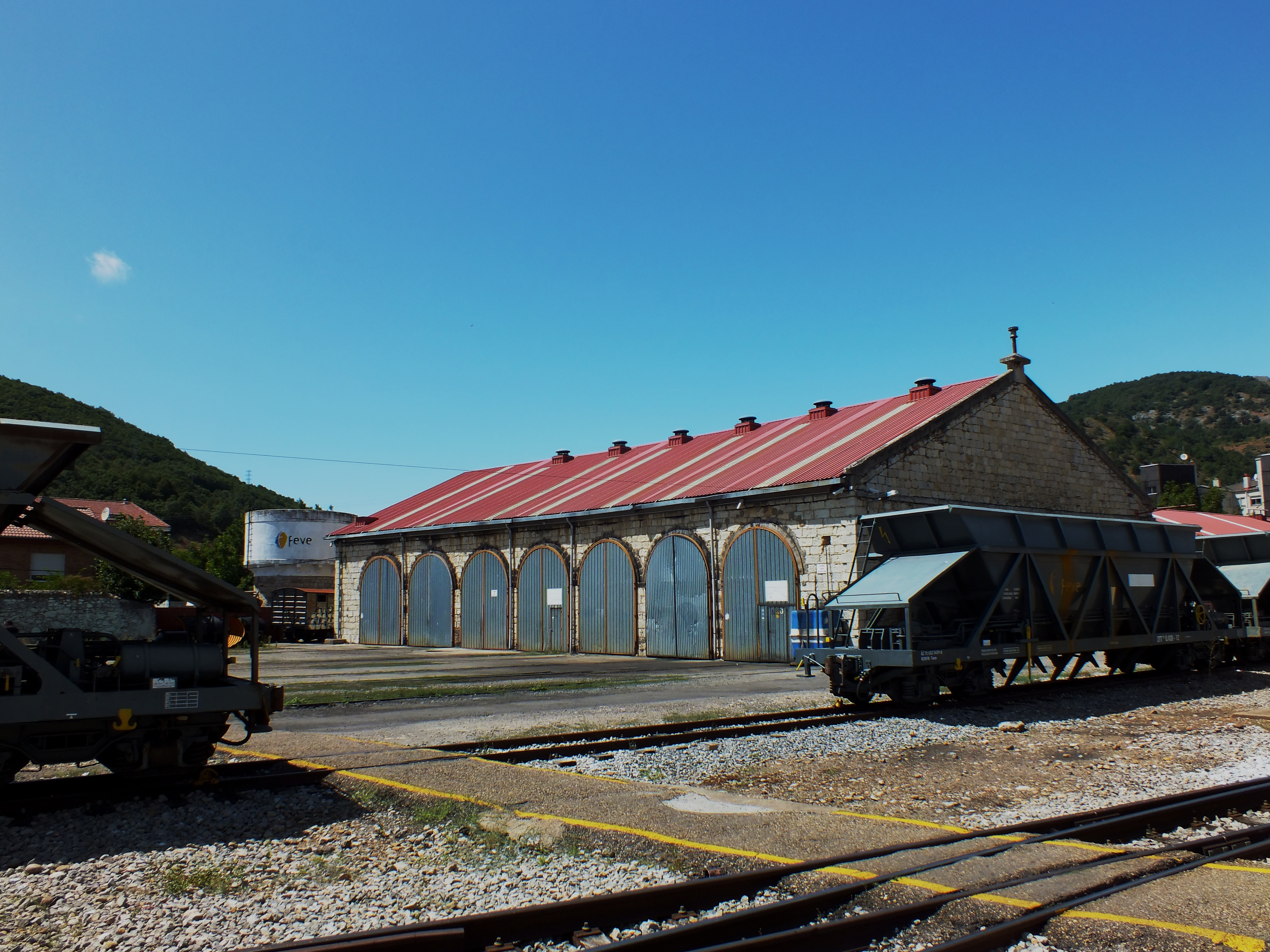 Talleres ferroviarios junto a la estación de Cistierna (León, España)